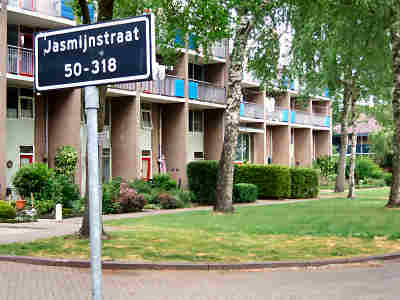 Zelfgemaakte foto op 9 mei 2007. Jasmijnstraat in Vaassen.